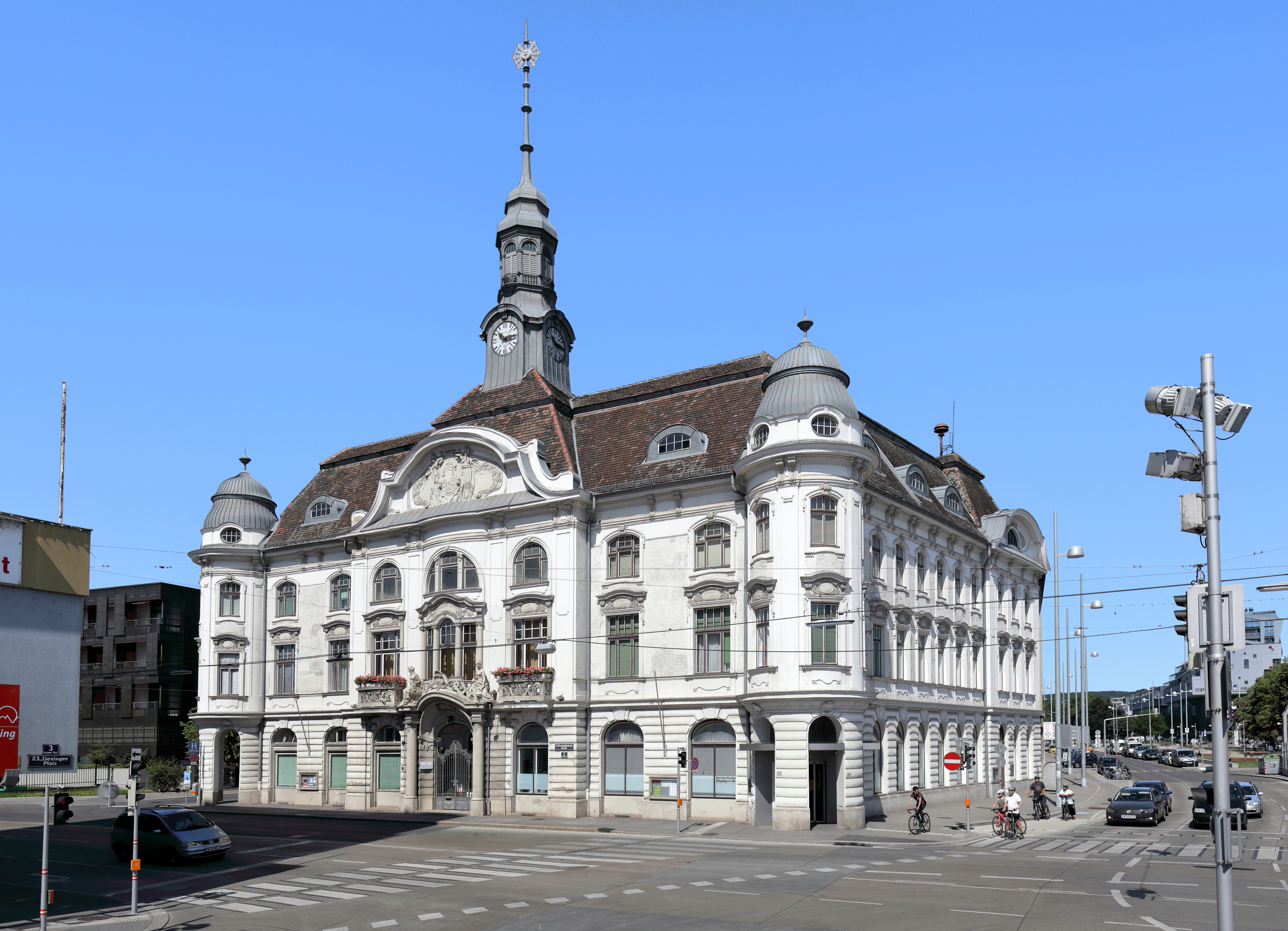 Das Amtshaus Liesing an der Perchtoldsdorfer Straße 2 im 23. Wiener Gemeindebezirk Liesing. Das dreigeschossige Gebäude im Neorenaissancestil mit neobarocken Elementen wurde ab 1903 (Grundsteinlegung) nach Plänen der Architekten Helmer und Fellner als Rathaus errichtete und am 7. Februar 1904 eröffnet.